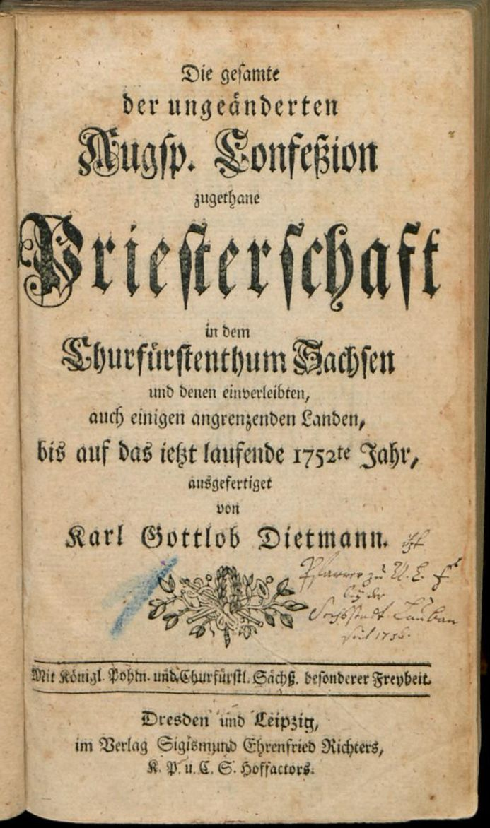 Titelblatt von Karl Gottlob Dietmann: (Erster Band, So die Priesterschaft unter E. H. Consistorio zu Dresden in sich begreift): im Verlag Sigismund Ehrenfried Richter, Dresden und Leipzig 1752, 1522 Seiten Digitalisat in der Universitätsbibliothek Halle